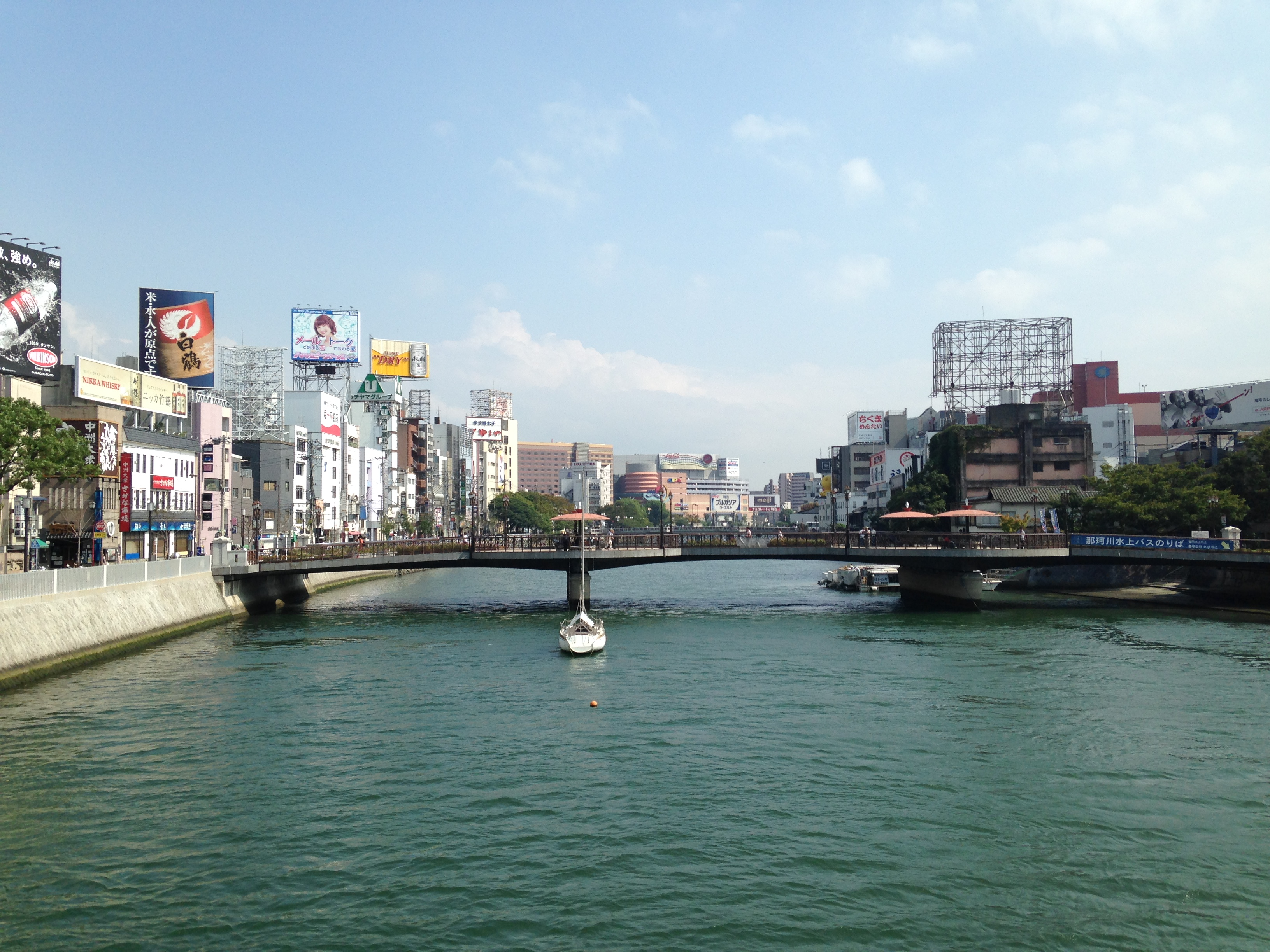 西大橋より望む那珂川(上流側)